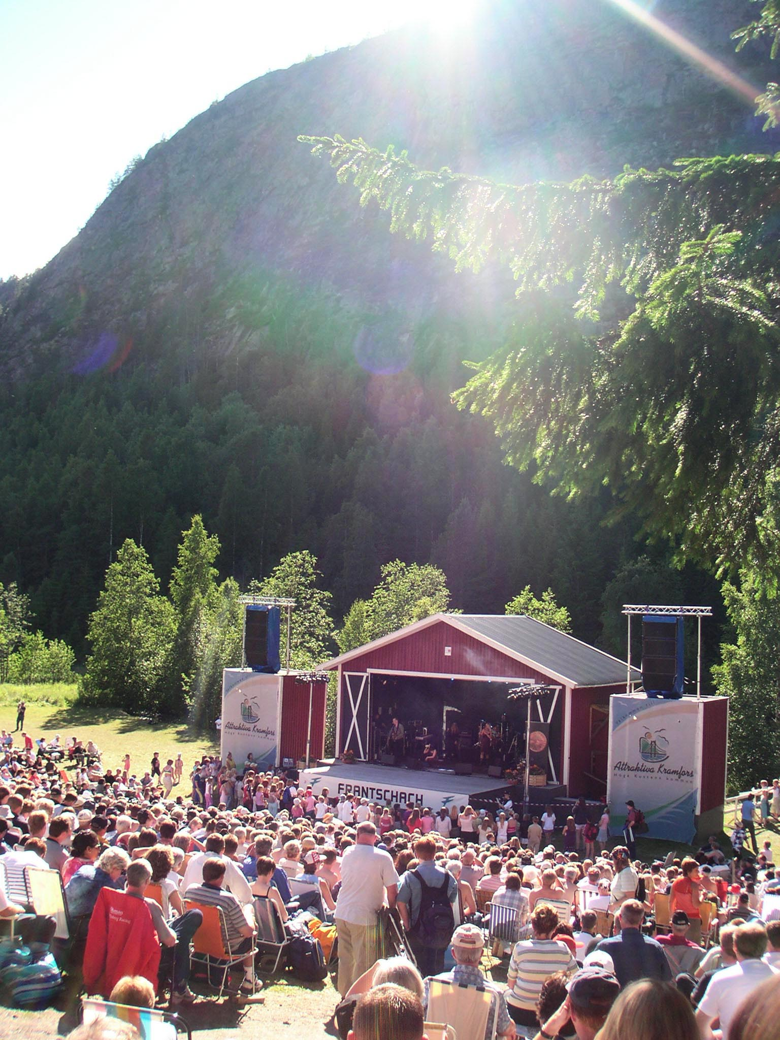 Skulefestivalen